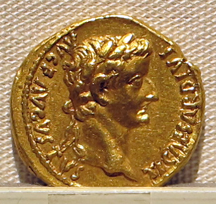 Palazzo Massimo alle Terme